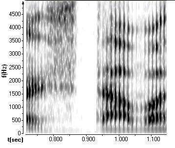 Espectrograma de la palabra "estaba"